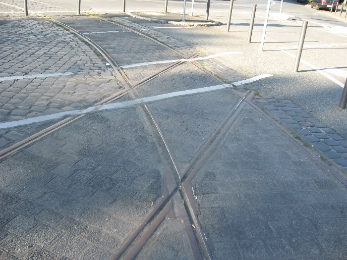 Stillgelegte Straßenbahngleise am Frankfurter Ostbahnhof